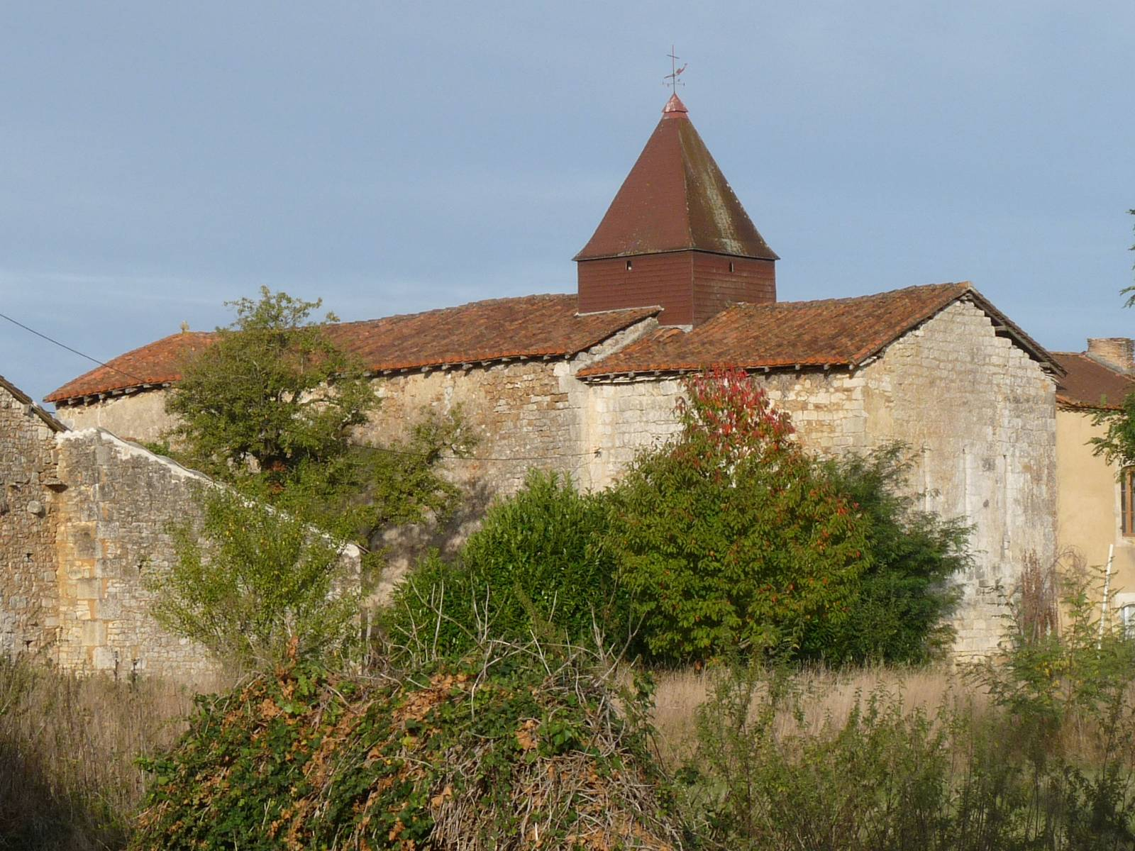 église de La Tâche, Charente, France